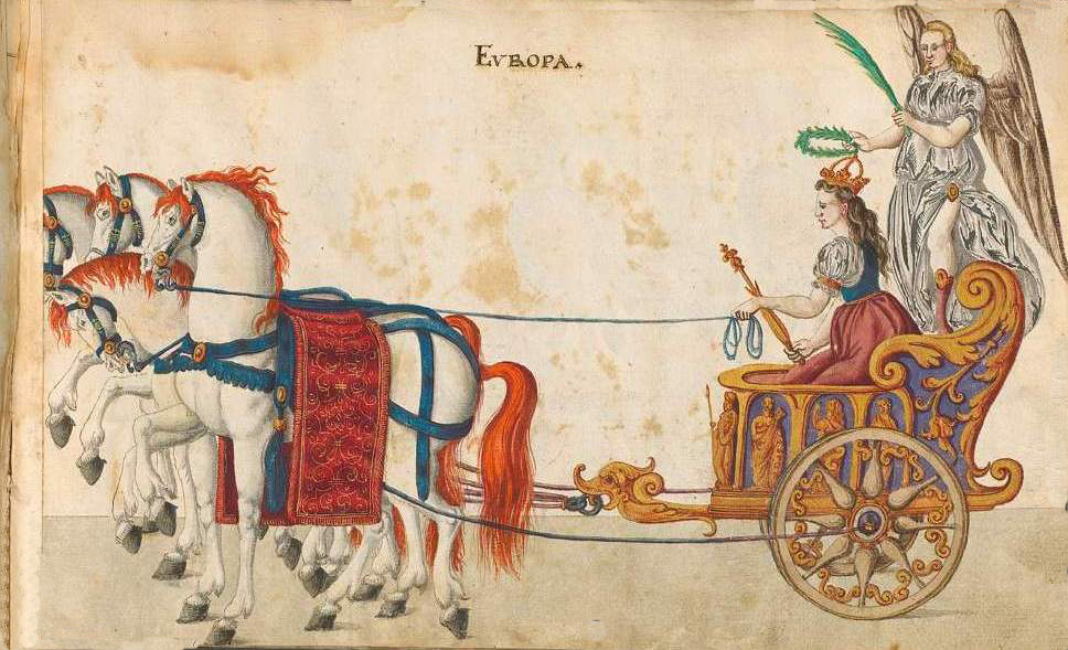 Representación simbólica del Continente Europeo